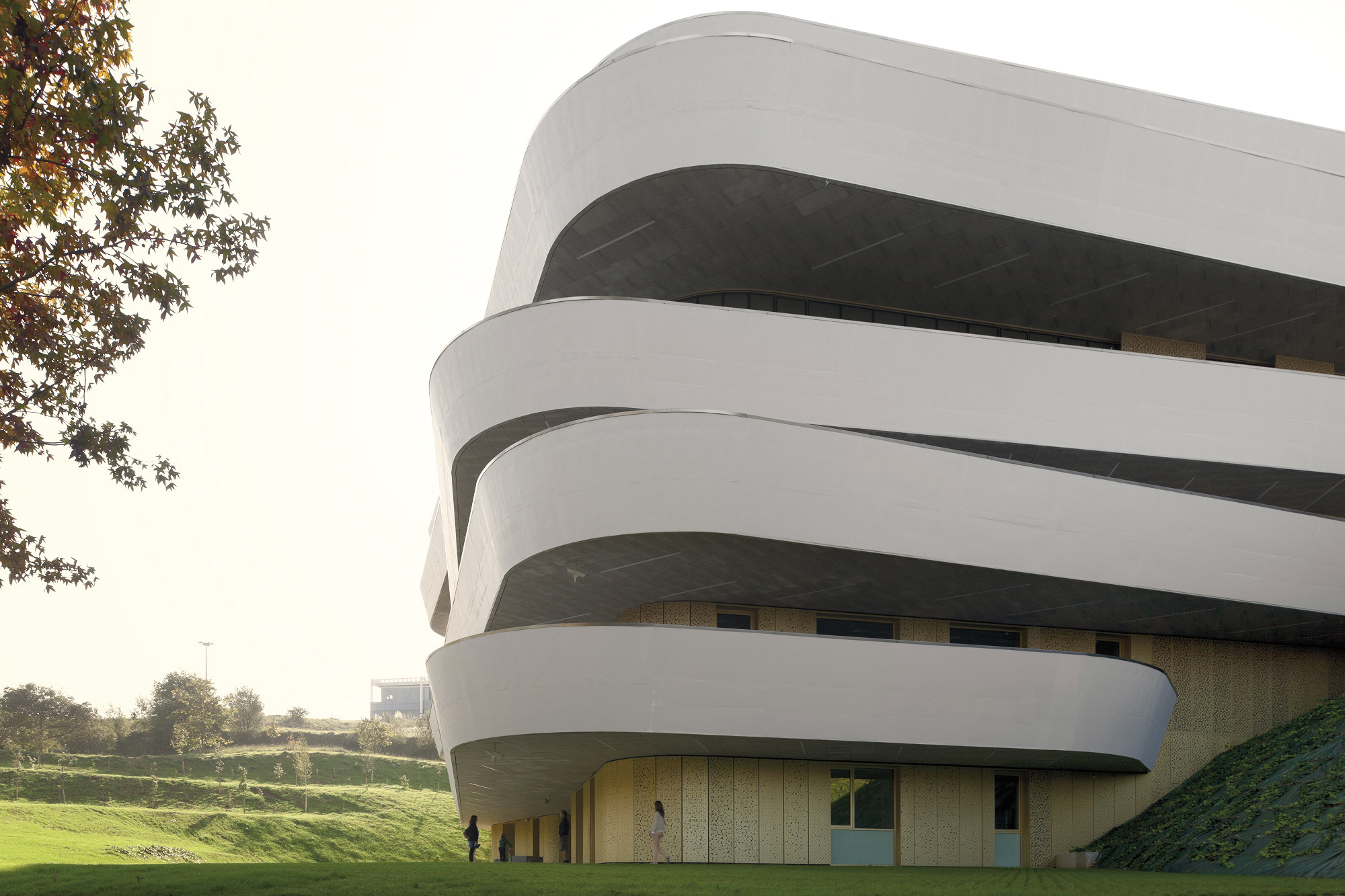 Basque Culinary Centerreko eraikina Donostian